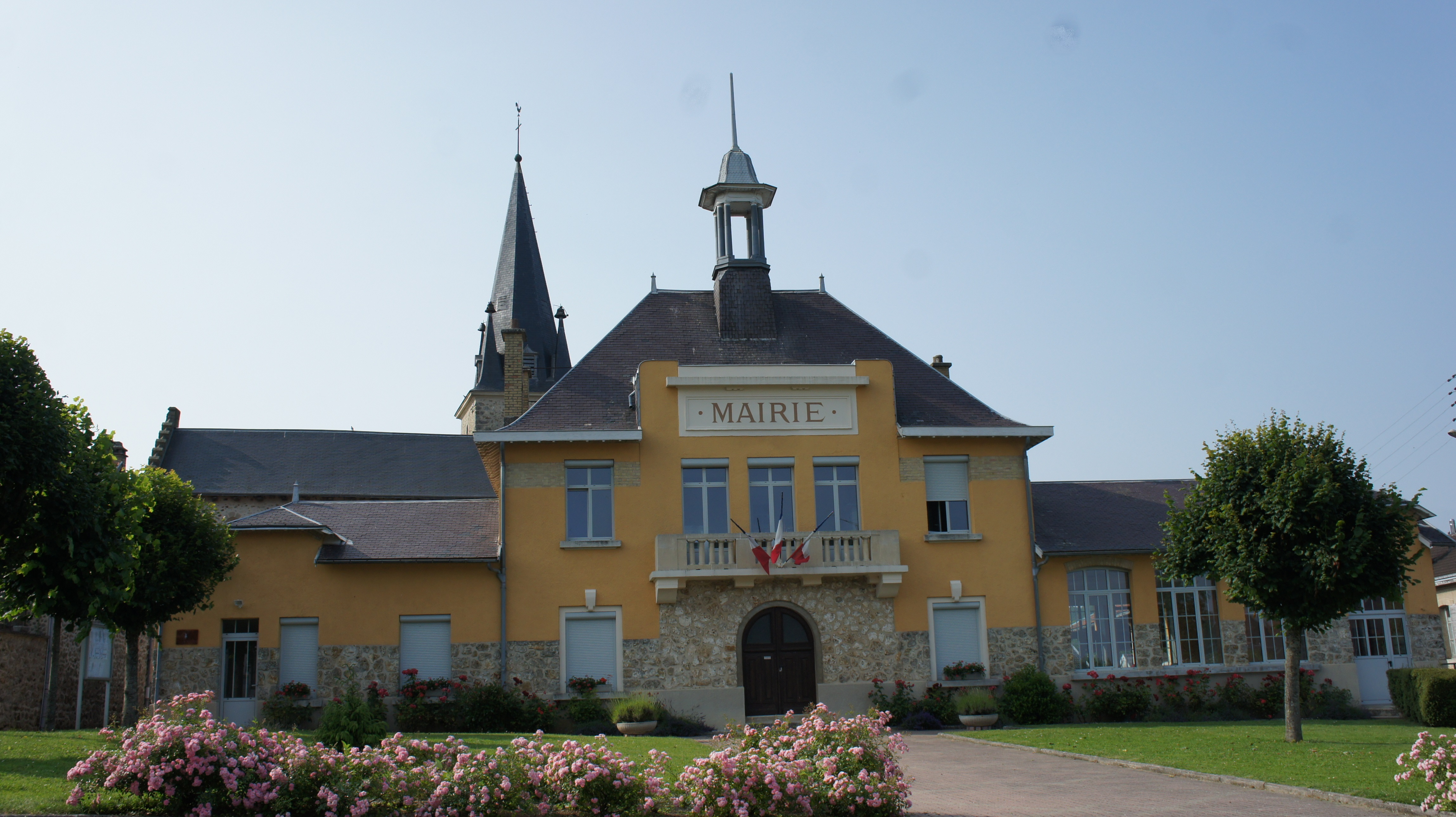 vue de l'Hôtel de ville.